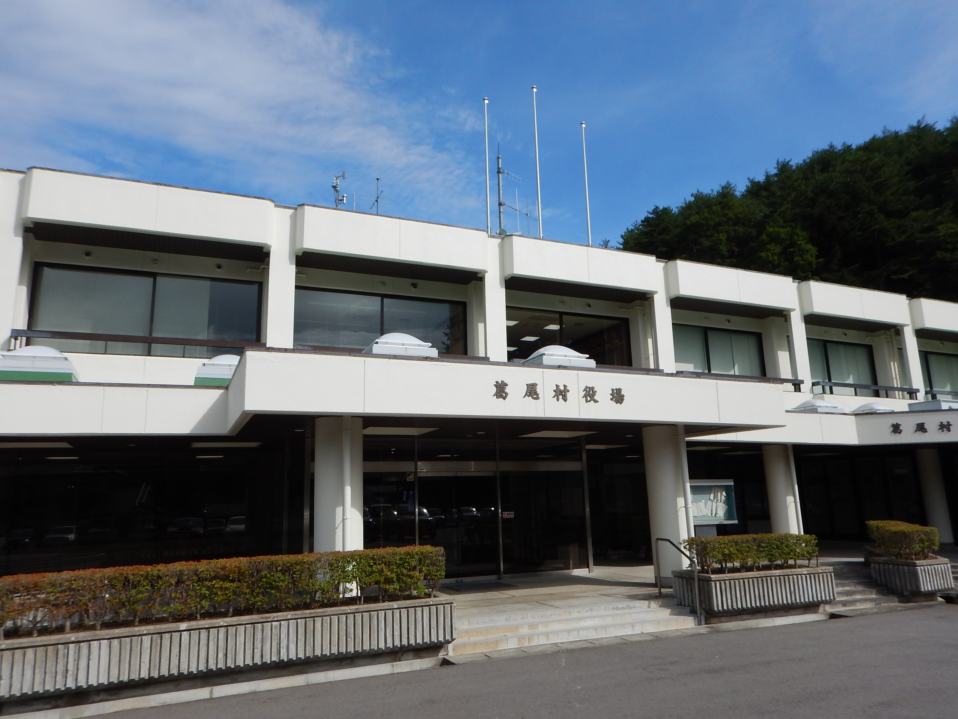 福島県葛尾村役場 正面入口